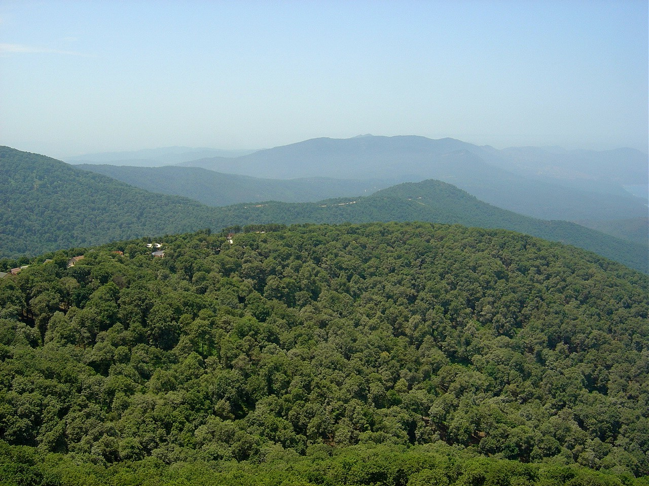 serraidi